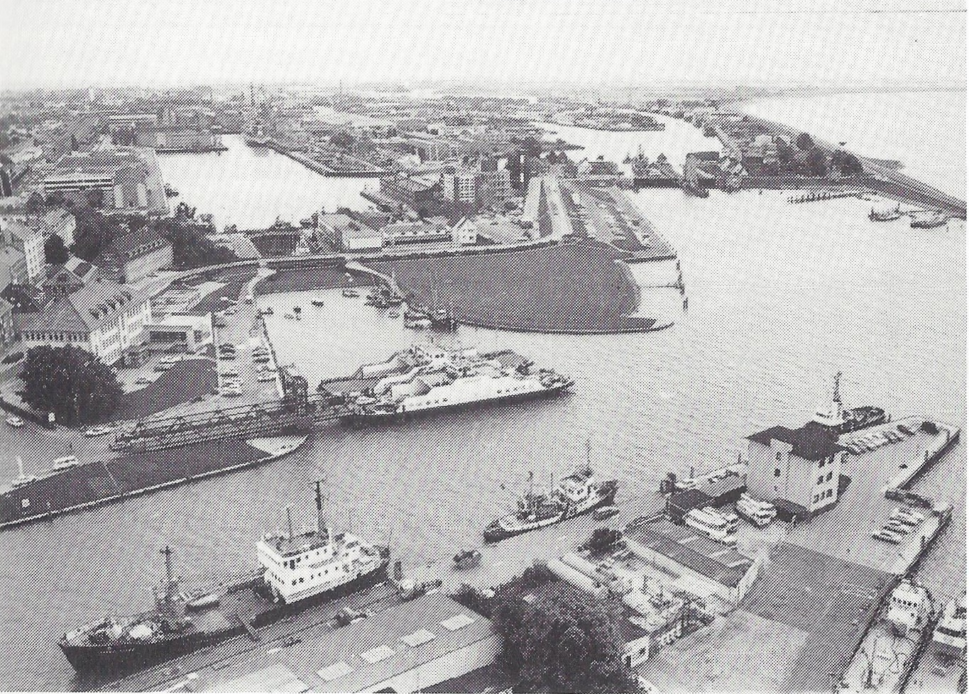 Geestevorhafen in Bremerhaven, Blick vom Radarturm nach Süden: Unten auf der Nordseite der Geeste in Mitte (Bremerhaven) die Pier für Schlepper; gegenüber auf der Südseite in Geestemünde Anleger der Weserfähre Bremerhaven–Blexen, Seefahrtschule Bremerhaven und Hansestadt Bremisches Amt. – Links die frühere Einfahrt zum Handelshafen mit zugeschüttetem Außentor und Nordseemuseum, dahinter der Verbindungskanal zum Fischereihafen; hinten die Seebeck-Werft. – Rechts die Doppelschleuse zum Fischereihafen, davor die Schwimmbrücken für die Boote von Zoll und Wasserschutzpolizei. – Am rechten Rand oben die Weser, unten die frühere Einfahrt zum Alten Hafen.